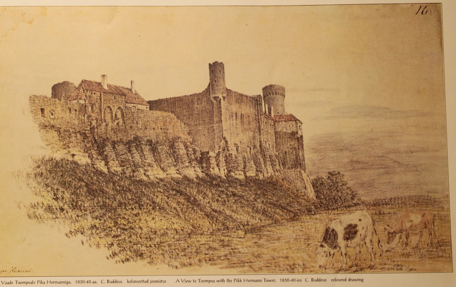 vaade Toompeale Pika Hermanniga